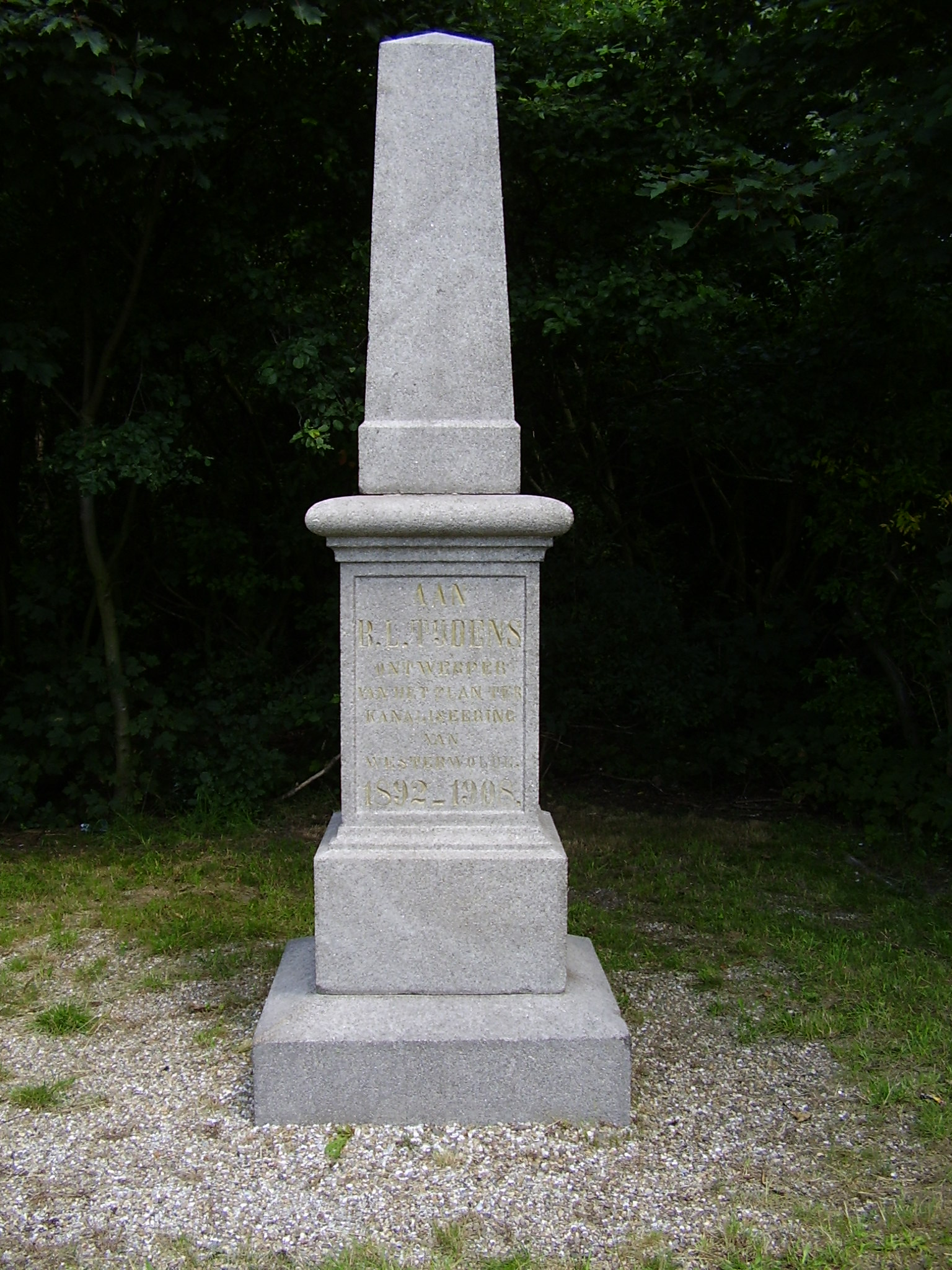 Het monument voor B.L. Tijdens aan het B.L.Tijdenskanaal Bij Vriescheloo. Het opschrift luidt: Aan B.L. Tijdens Ontwerper van het plan ter kanalisatie van Westerwolde 1892-1908 Aan een andere zijde staat: Het dankbare Westerwolde. foto gemaakt door Marco Roepers in juli 2005